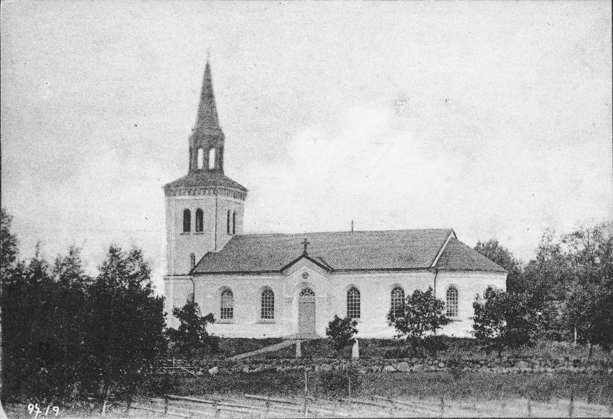 Kyrkan från söder. Kategori: (01) ExteriörerKyrkan från söder.